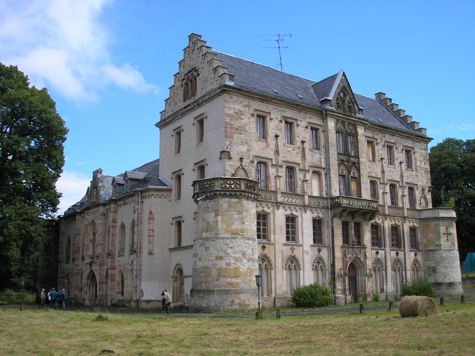 Schloss Reinhardsbrunn bei Friedrichroda (Thüringen).